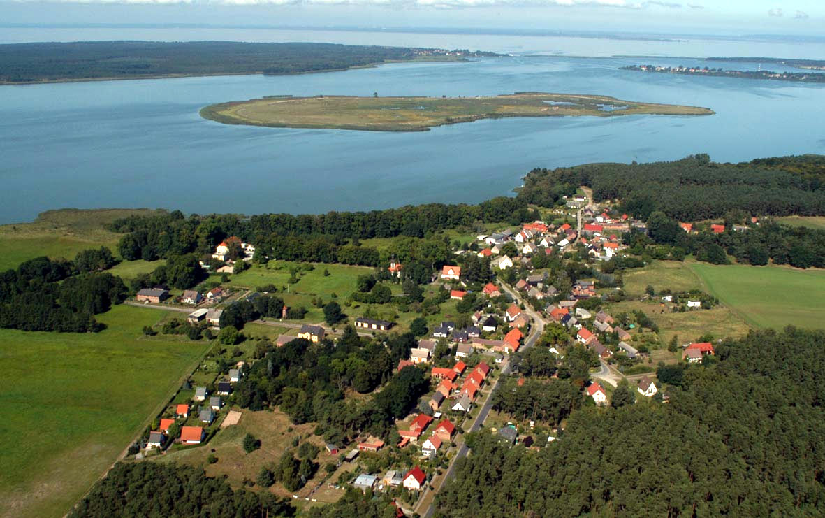 Das kleine Fischerdörfchen Rieth aus der Vogelperspektive